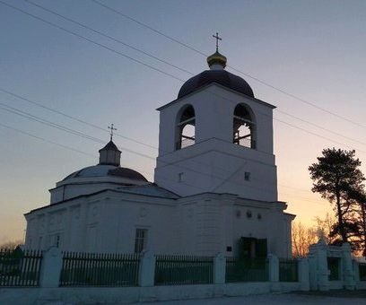 Воскресенский собор в городе Нерчинск